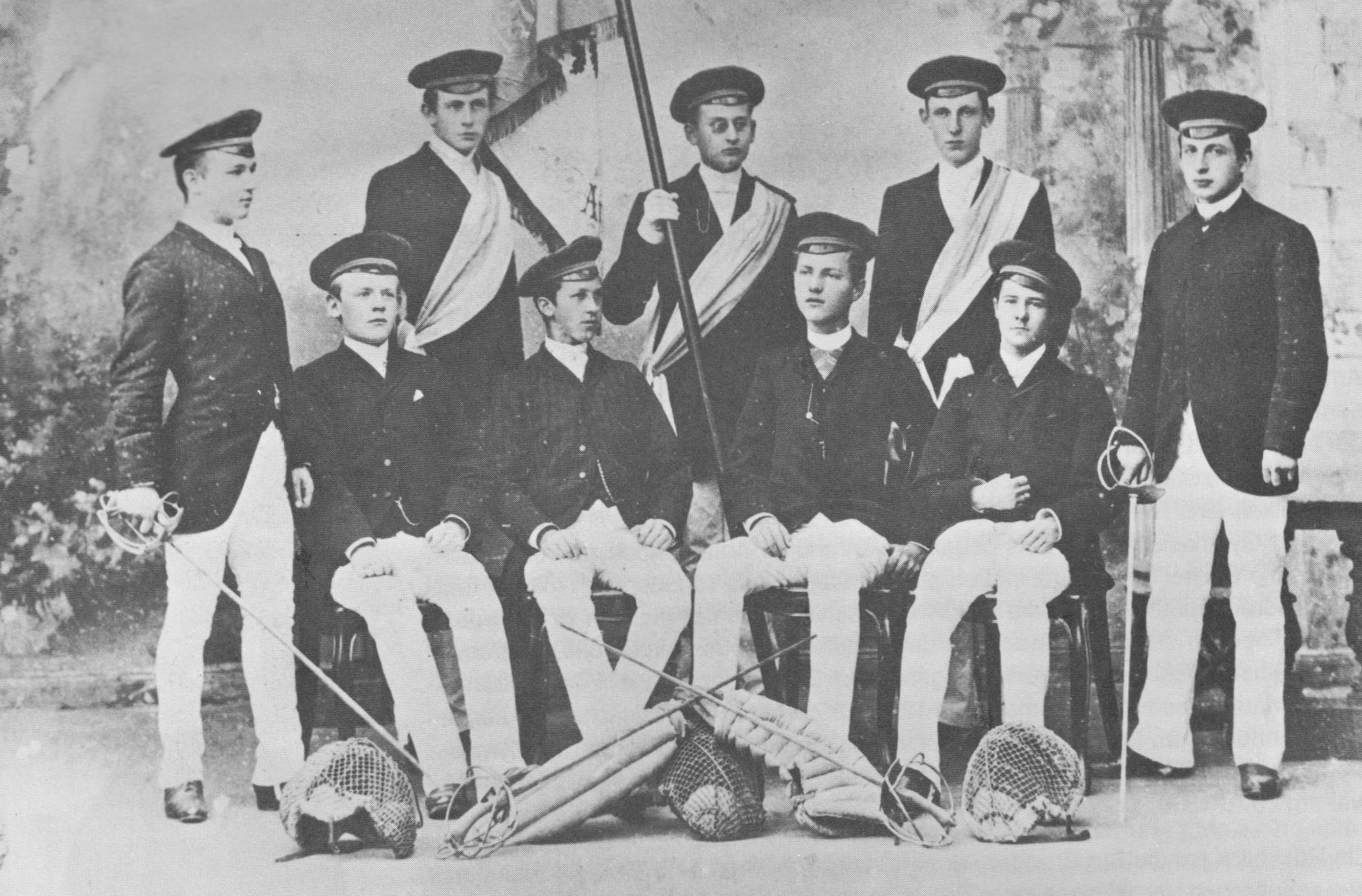 Primanerverein des Realgymnasiums